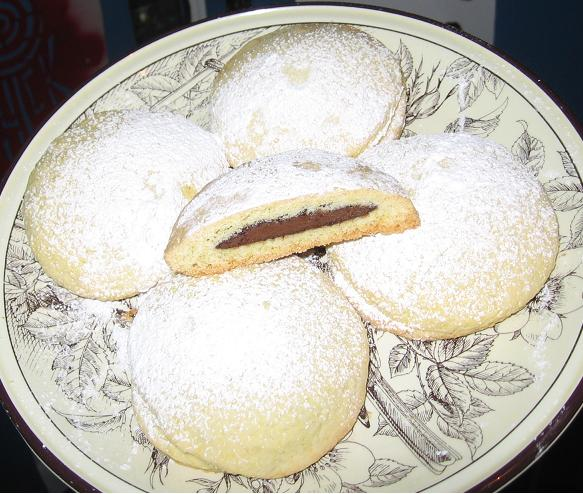 Nutella cookies. You can find the italian recipe here.